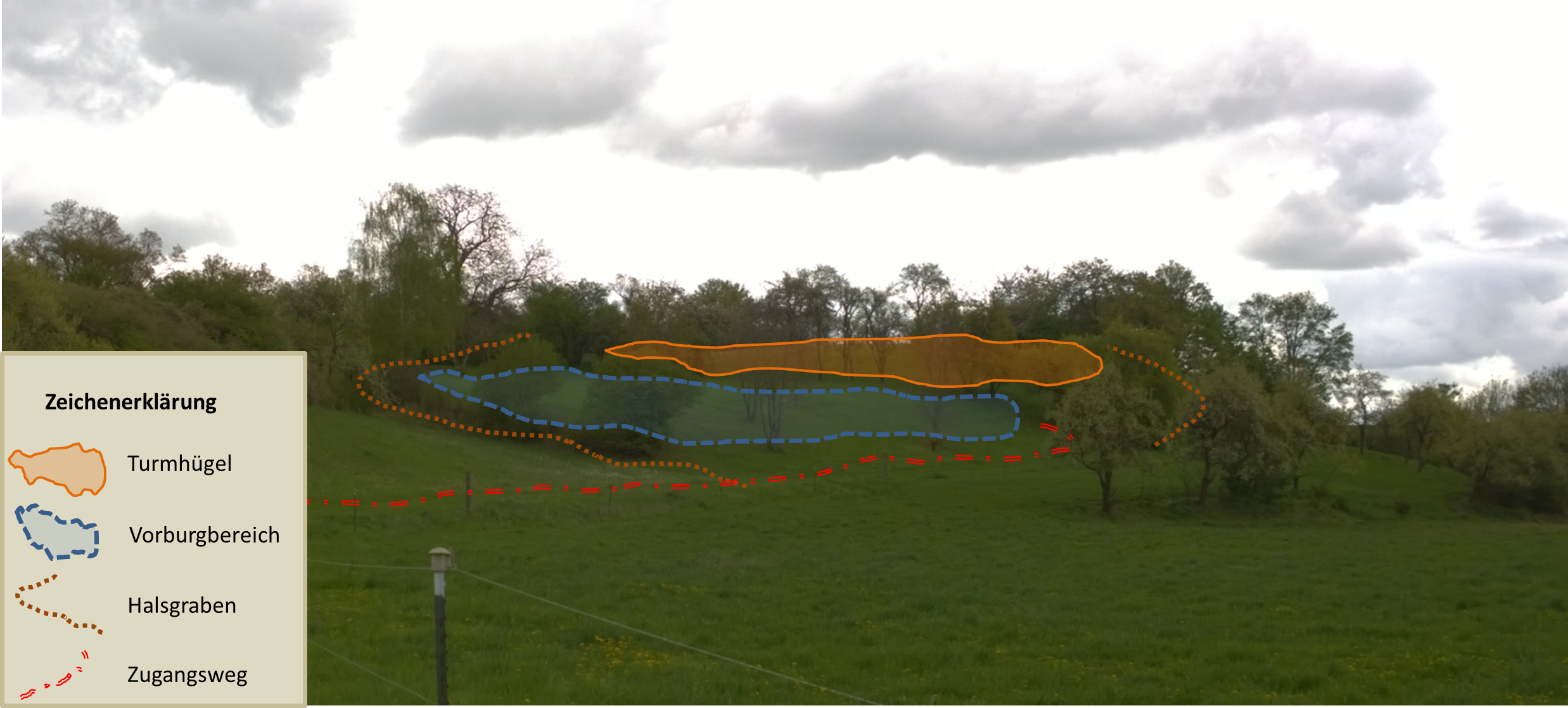 Burgstall Erbshausen: Blick von Nordwesten auf den Burgstall mit Kennzeichnung der Burgreste